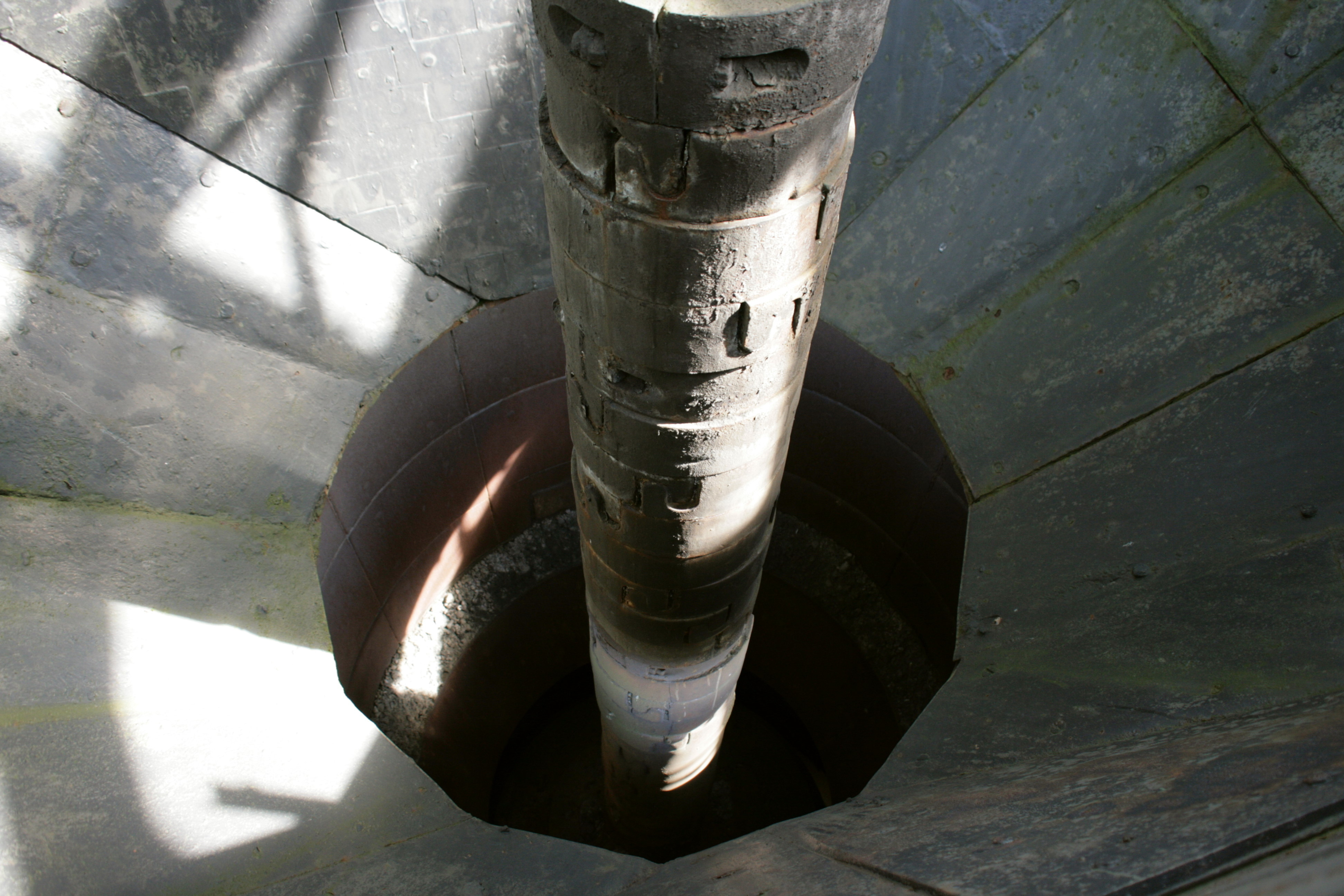 Trichterdrehwerk von Hochofen 3 der Henrichshütte in Hattingen